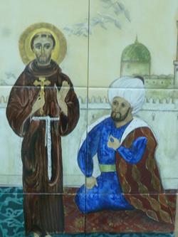 Capucin au Pays du Levant ( Paroisse Saint-Louis des français à Istanbul)